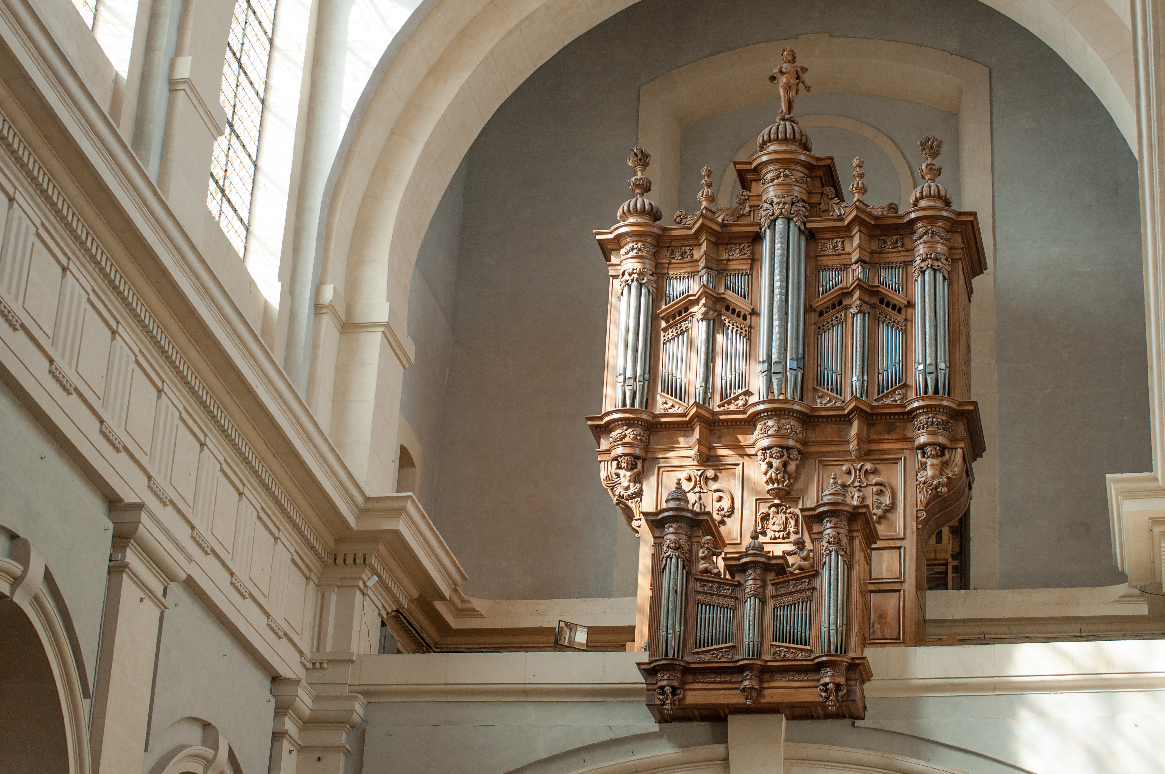 Cathédrale de Montauban (82) : le grand orgue